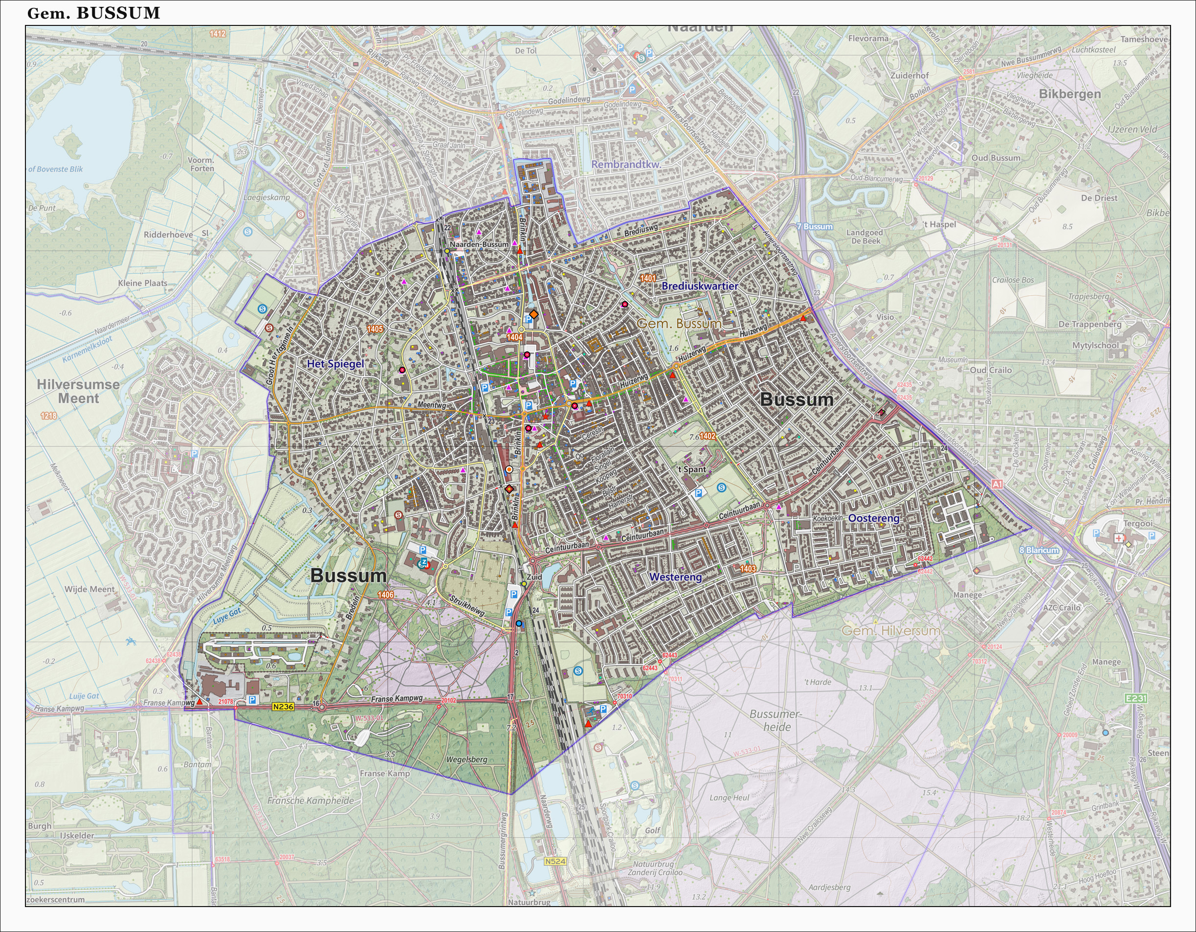 Topografische gemeentekaart. Resolutie: 400 pixels/km. Kaartbeeld samengesteld uit de open geodata van de Top10NL en Top25namen (Kadaster), Creative Commons-BY licentie. Gebouwvlakken uit open geodata BAG extract. Wegen uit de OpenStreetMap, OpenStreetMap community. Reliëfschaduw uit de Actuele Hoogtekaart AHN2. Samenstelling en kleurenschema: Jan-Willem van Aalst, met QGIS. Zie ook de Legenda.